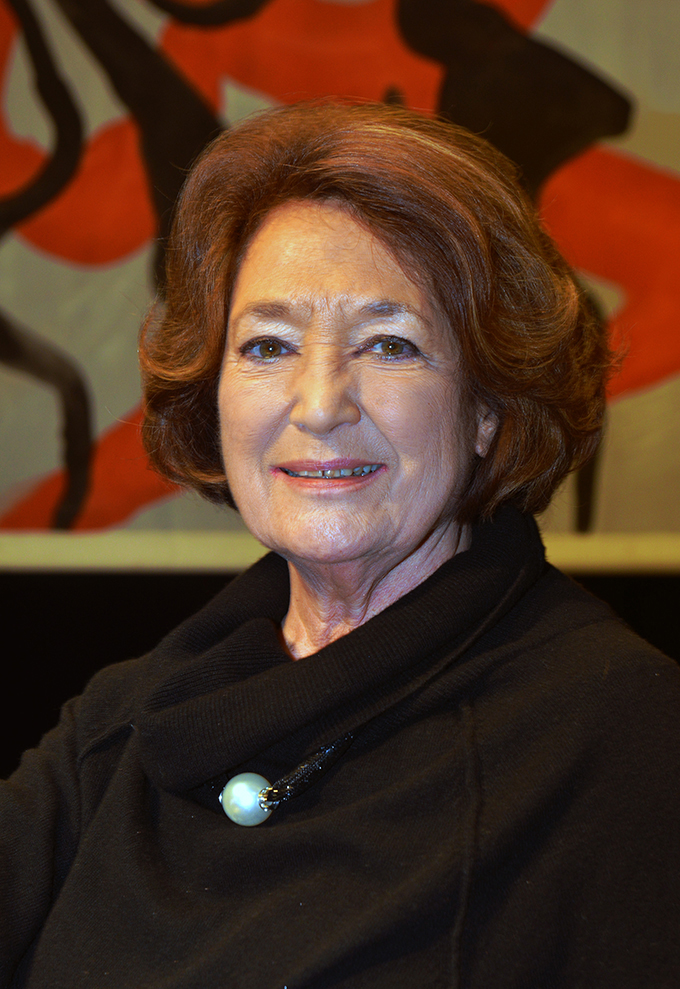 Ritratto di Edda Moser (soprano tedesco e docente universitaria) - Teatro Nuovo - Spoleto 2016